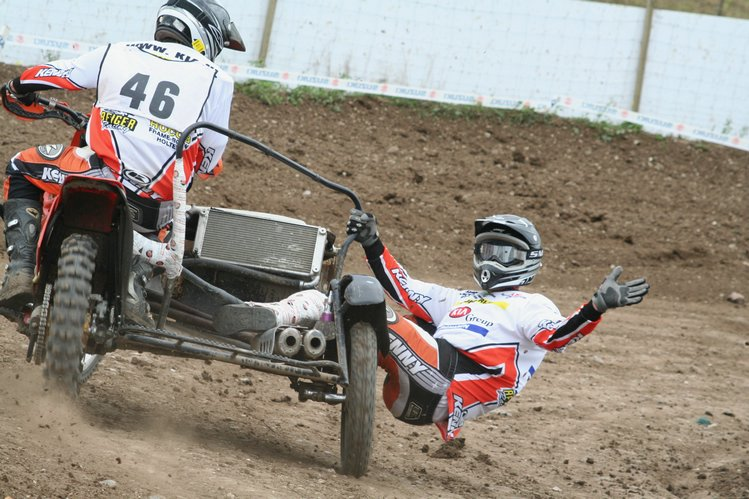 zijspancross op een harde ondergrond. Patrick Greup and Marc van Deutekom in the 2006 sidecarcross worldchampionship.